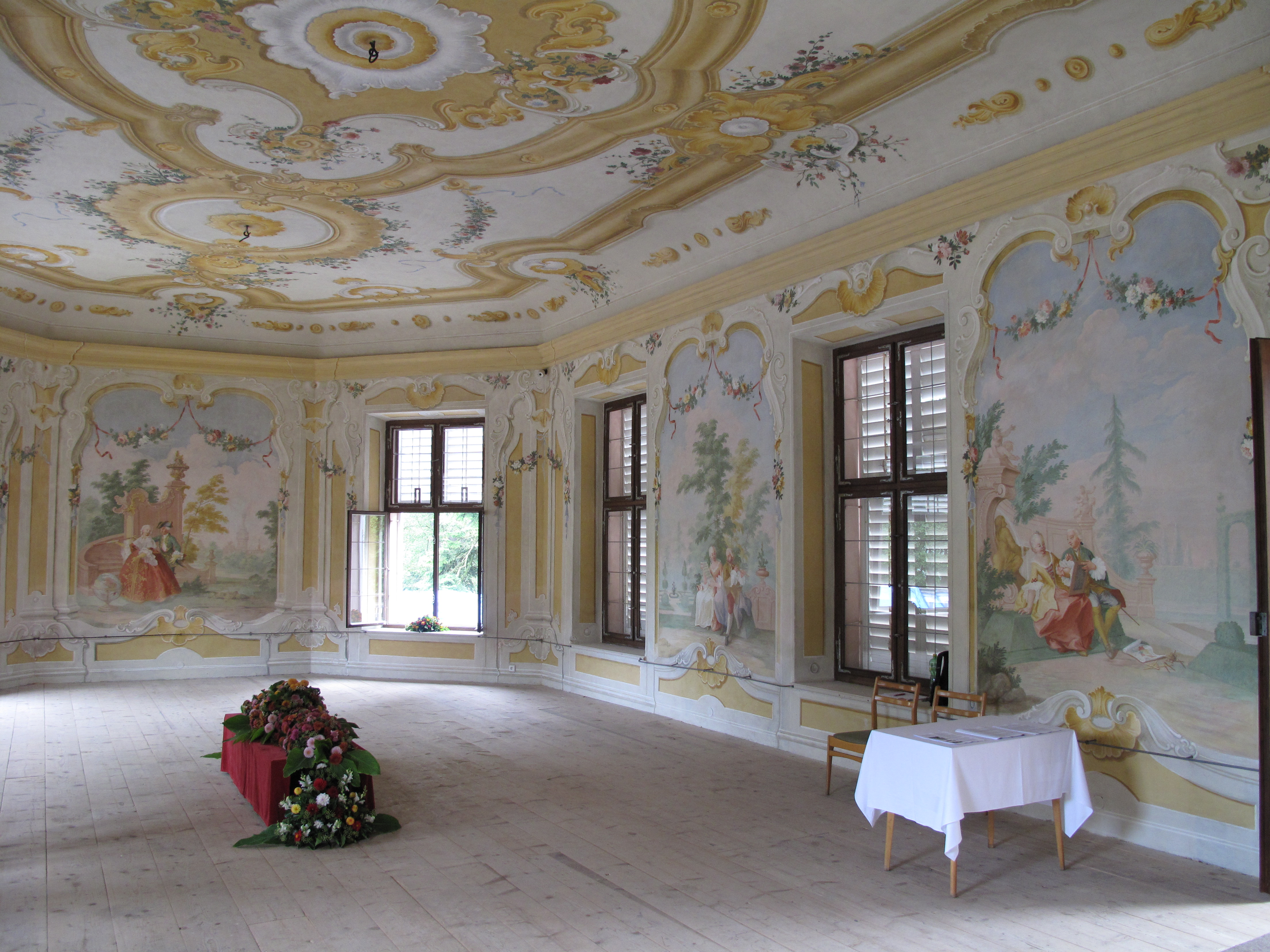 František Jakub Prokyš (1713–1791):... Fresky prvního patra zámeckého letohrádku Bellarie, Český Krumlov, Česká republika.